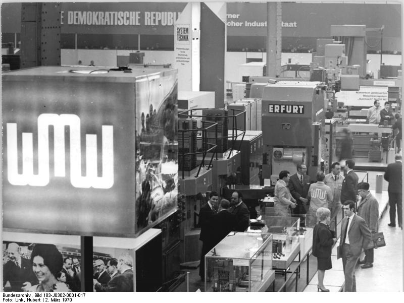 Leipzig, Frühjahrsmesse, Maschinenbau Zentralbild Link 2.3.70 Leipziger Frühjahrsmesse 1970- In der Halle 20 stellen die WMW Erfurt eine Querwalzenmaschine für die Massivumformung rotationssymmetrischer Werkstücke aus. Damit wird eine Automatisierung des gesamten Fertigungsprozesses erreicht.